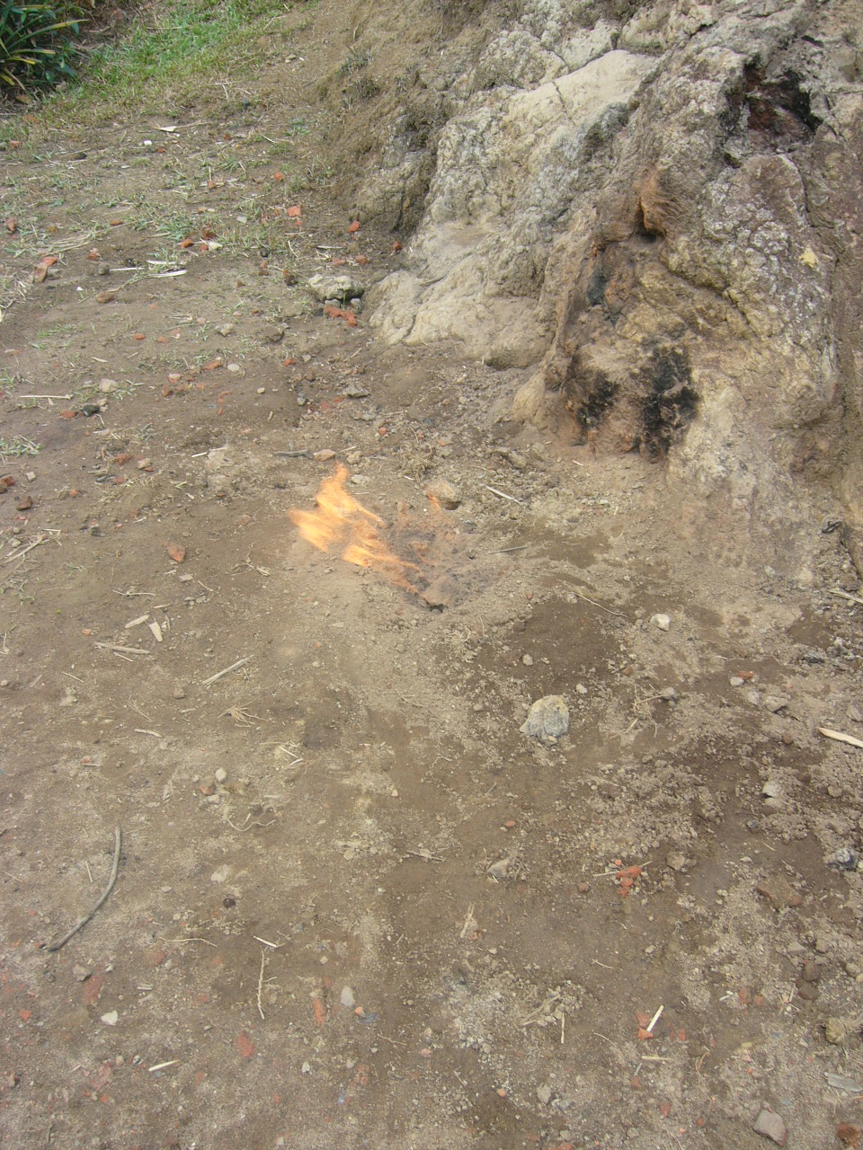 Haripur Gas Field Sylhet Bangladesh